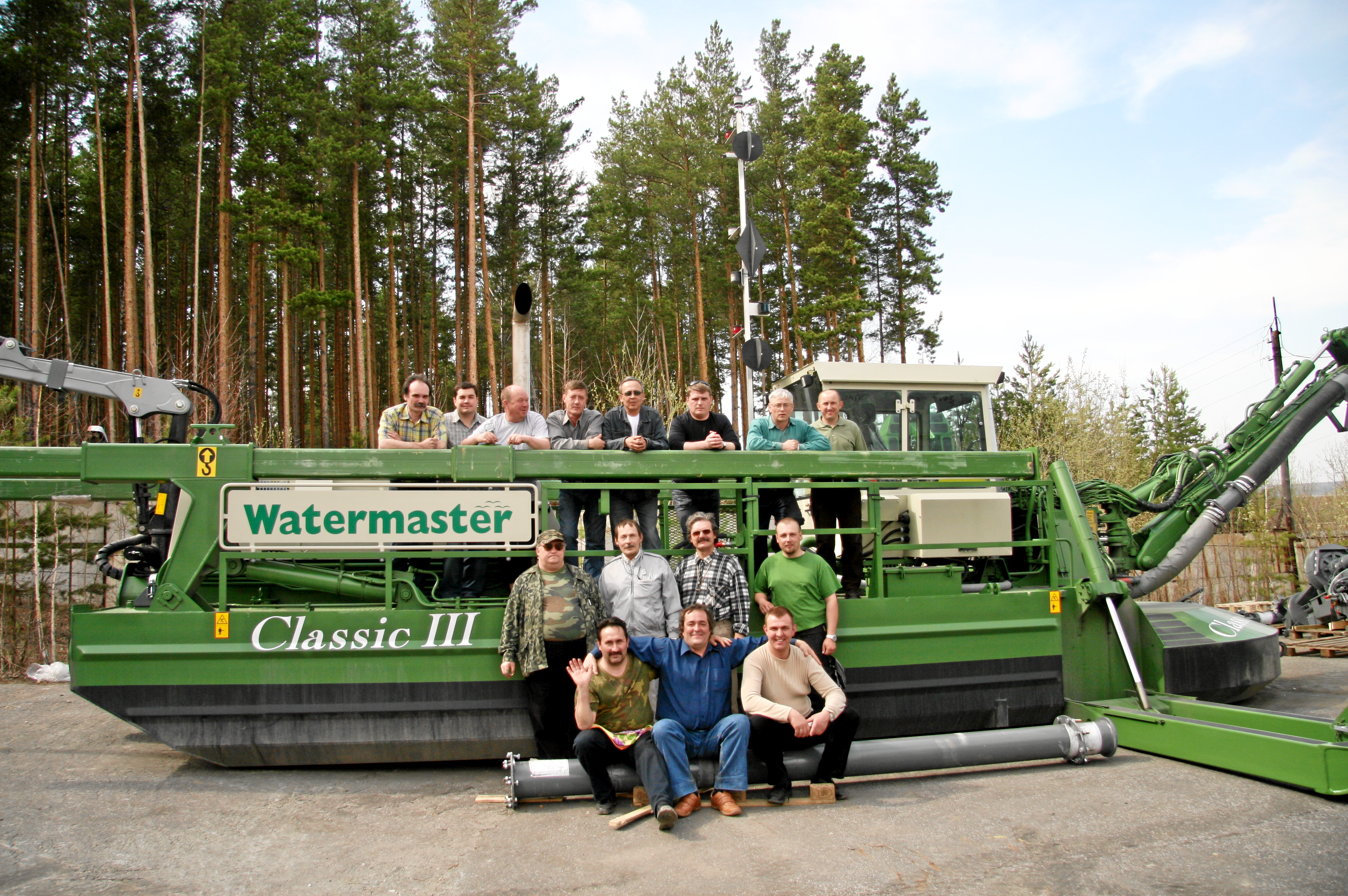 Финский земснаряд Watermaster и его команда: личный состав Участка очистки водохранилищ Екатеринбургского МУП «Водоканал»